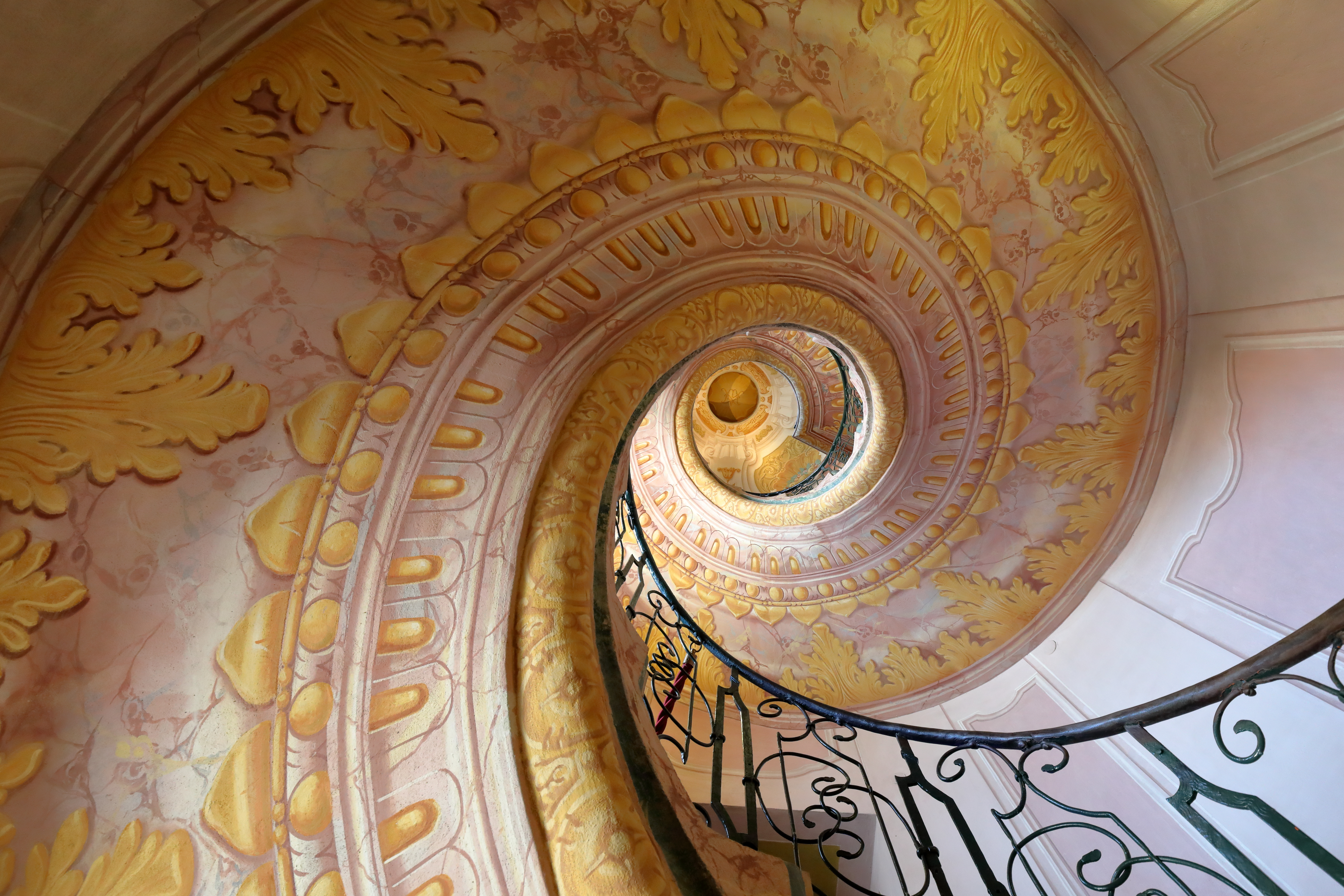 Wendeltreppe, die die Bibliothek und die Kirche des Benediktinerklosters in der niederösterreichischen Stadtgemeinde Melk verbindet.